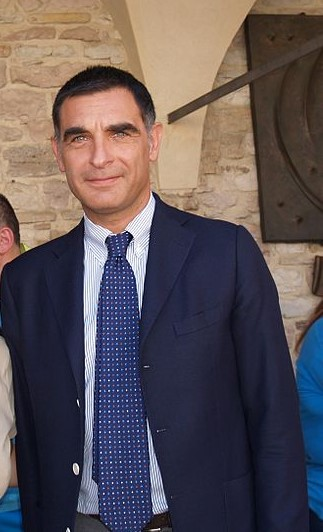 Tiberio Timperi ad Assisi